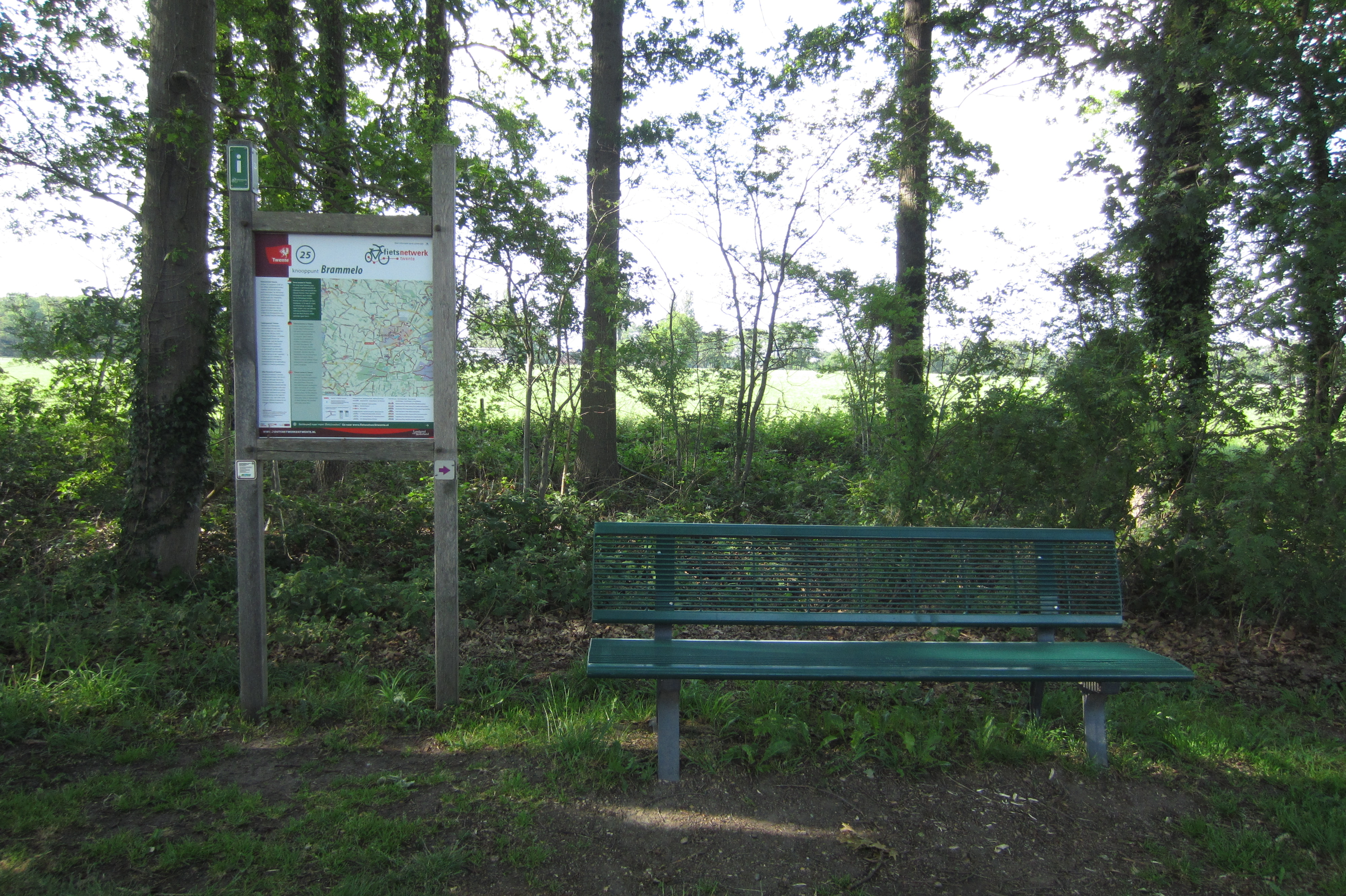 Bankje bij bord Fietsnetwerk Twente knooppunt 25 Brammelo